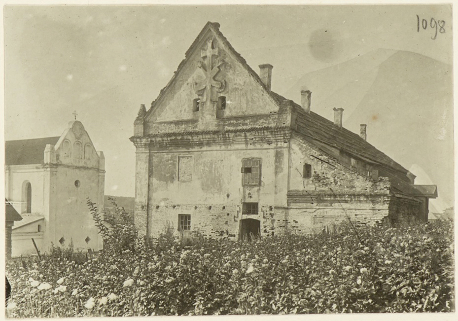 Беларуская (тарашкевіца): Ворша (Vorša), вуліца Дамініканская (vulica Daminikanskaja). Касьцёл Сьвятога Антонія Падуанскага і кляштар францішканаў